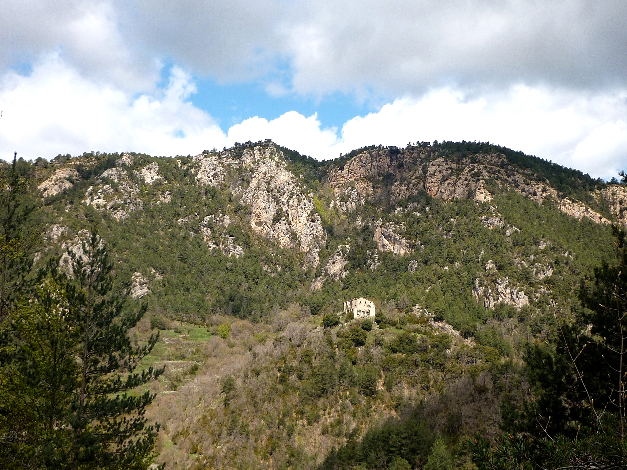 El Tossal, a les estribacions del sud de la Serra d'Ensija, s'aixequen per damunt del casal de les Canals de Catllarí (enclavament del municipi de Montmajor), a la dreta de l'Aigua de Llinars (Solsonès i Bergadà - Catalunya)